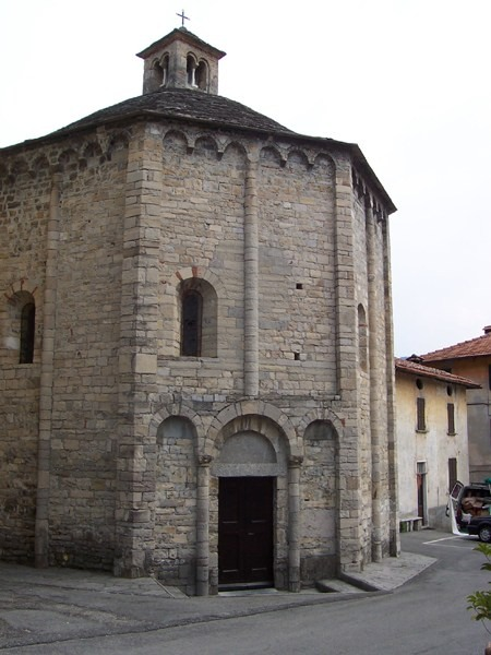 Lenno - Battistero